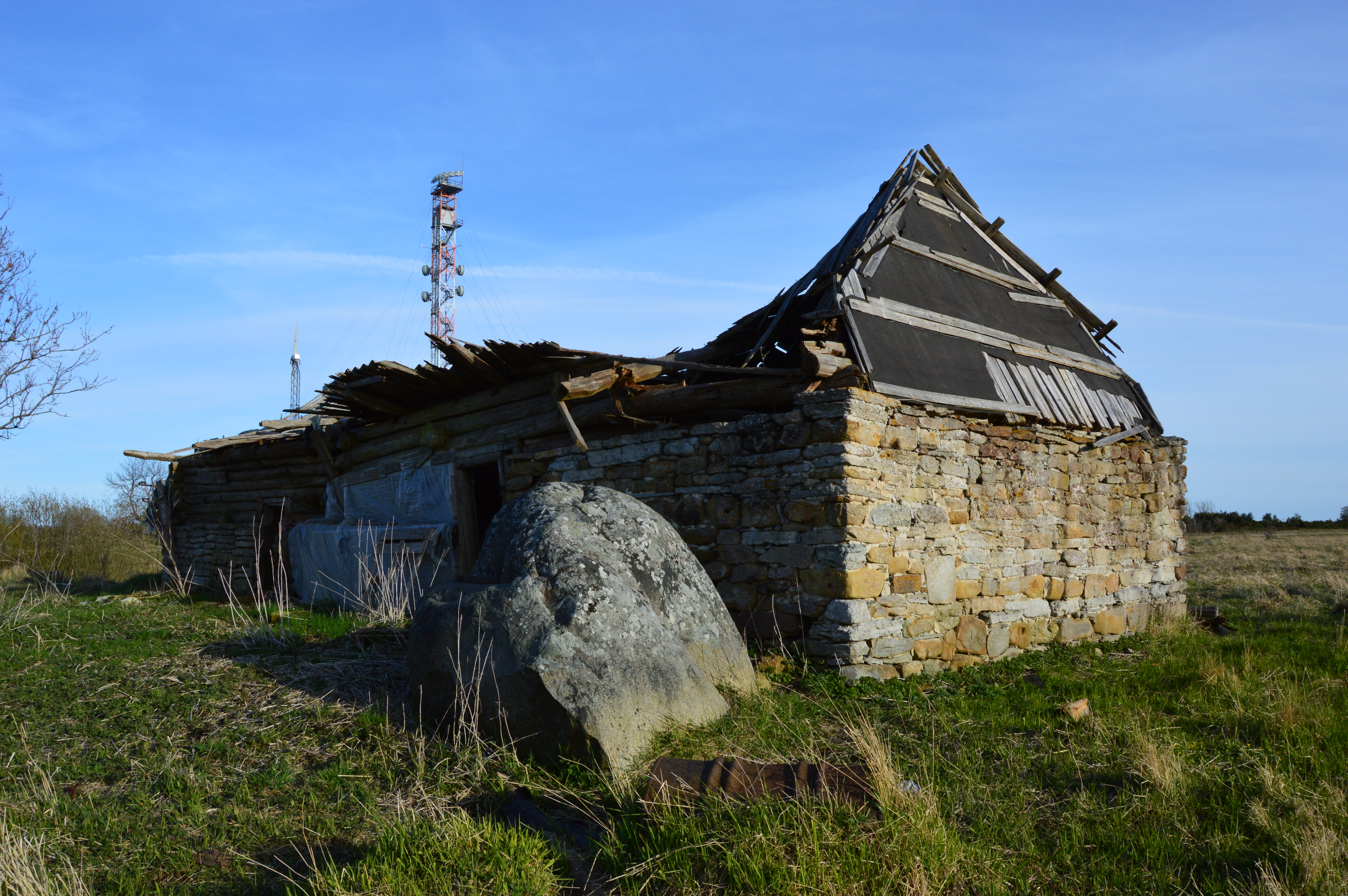 Marksi talu rehi, Osmussaar.